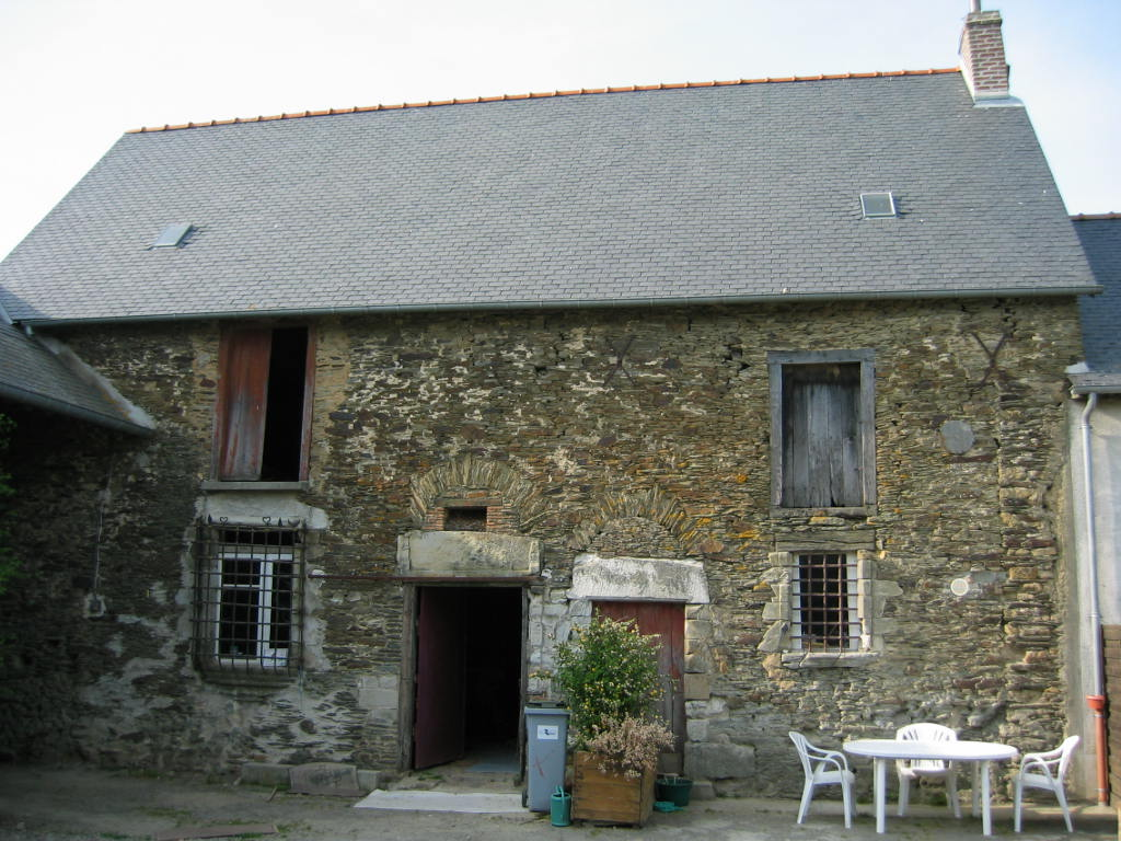 Noyal sur Vilaine - «Ancien Manoir du Haut-Jussé, à 2 kil. au sud-ouest du bourg et 400m. au sud de la route (Fin du XVIe s.) Il comprend un rez-de-chaussée et un étage. Sa porte conserve un écusson martelé soutenu par deux quadrupèdes. Le manoir fut vendu en 1680 par les Jamoays aux Pocquet.»